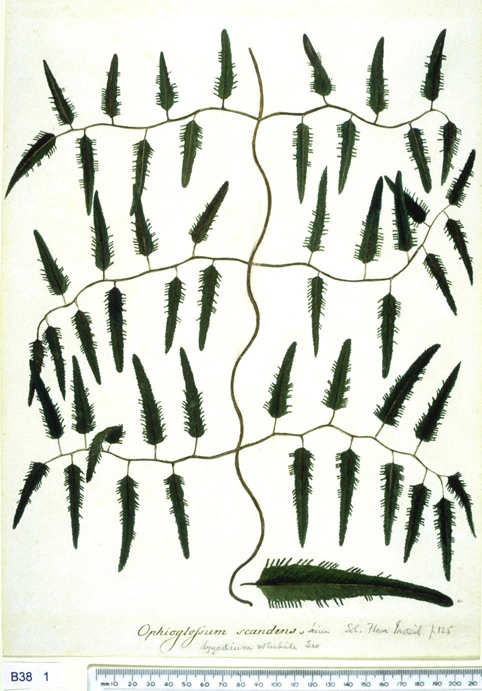 Lygodium volubile